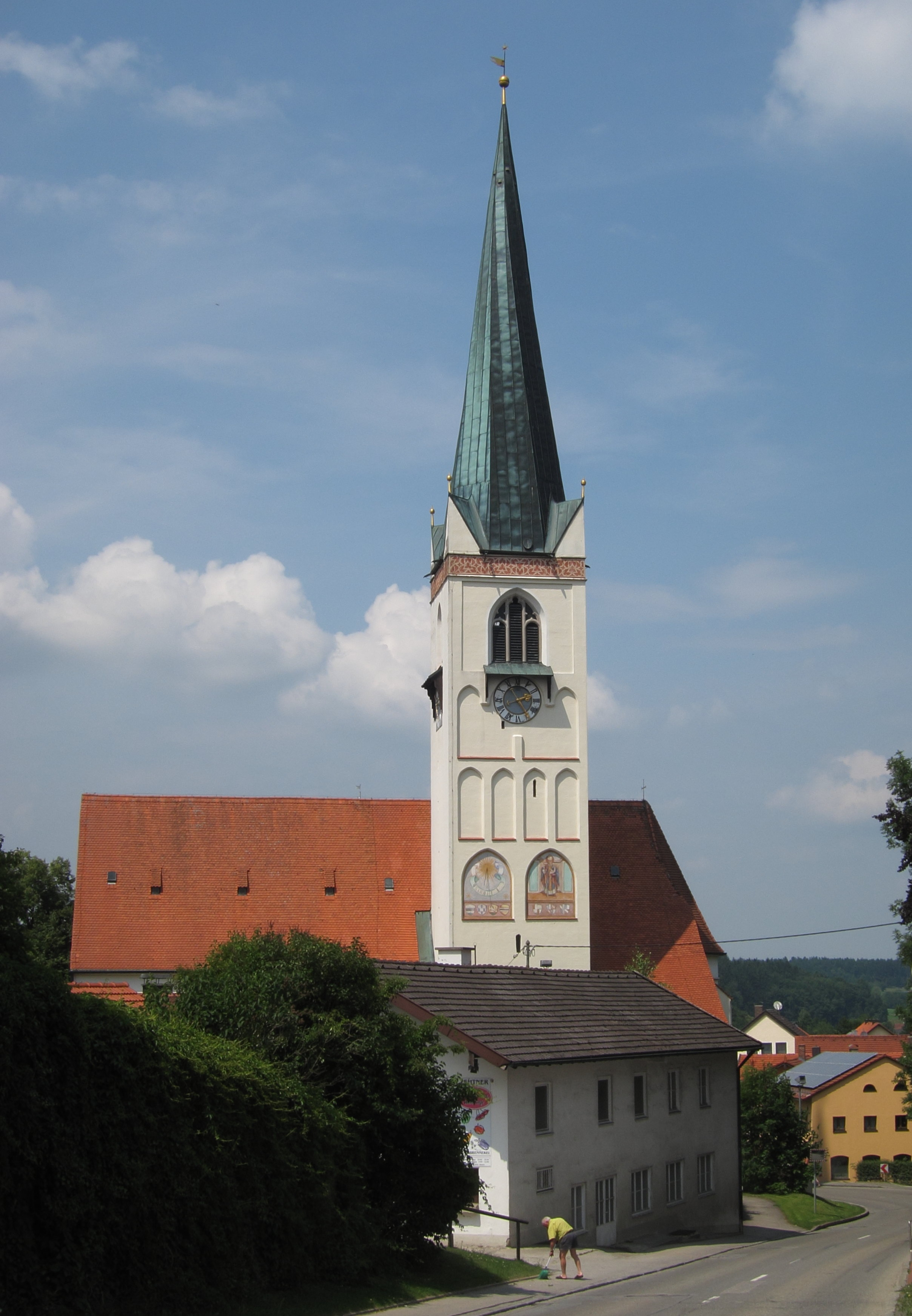 Katholische Pfarrkirche St. Wolfgang, bedeutender zweischiffiger Wandpfeilerbau mit Seitenkapelle, polygonalem Chorschluss, angefügter Sakristei und Chorflankenturm, Seitenkapelle Anfang 15. Jahrhundert, Hauptbau 1439–77, 1679 barockisiert; mit Ausstattung; Friedhofsmauer mit Eingangspfeilern; Kriegergedächtnisstätte, neobarocke Nischenkapelle mit Satteldach, nach 1918.